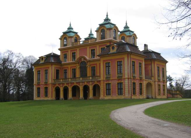 Ludwigsburg, Jagdschloss Favorite, vom Park aus gesehen Fotografiert von Mussklprozz am 2004-03-20 GNU-FDL